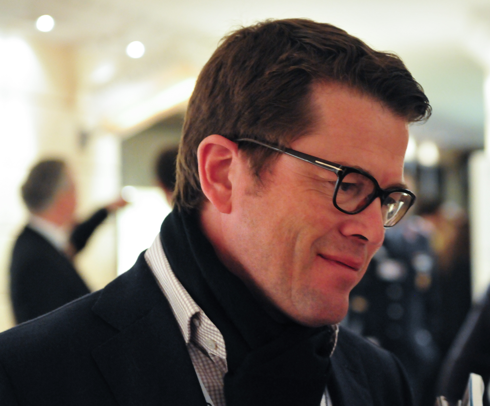 Munich Security Conference - Münchner Sicherheitskonferenz 2015